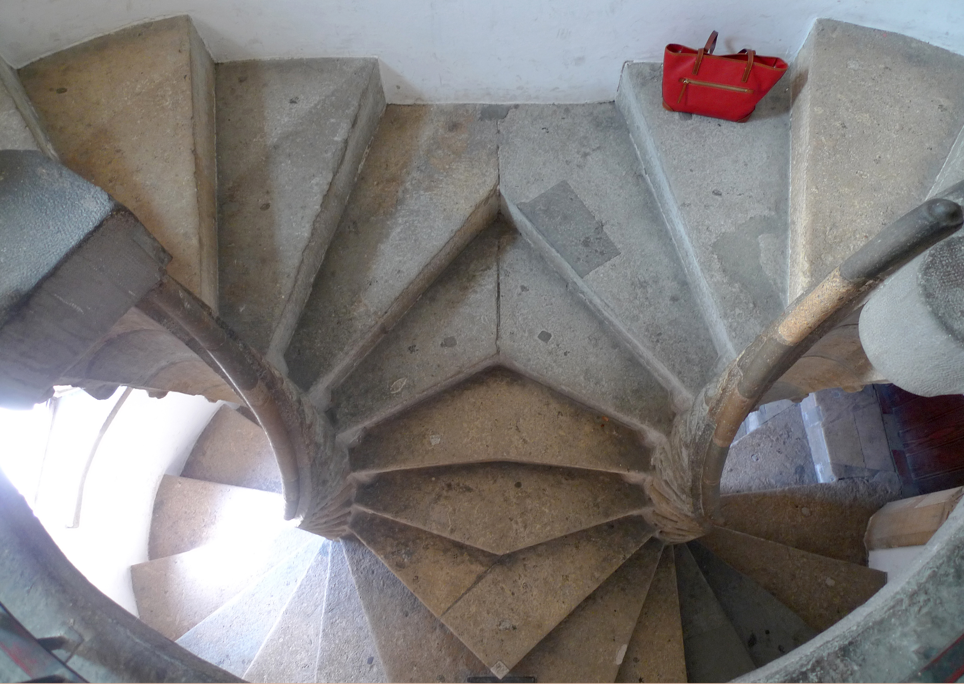 Burg, Sitz der Steirischen LR, Doppelwendeltreppe